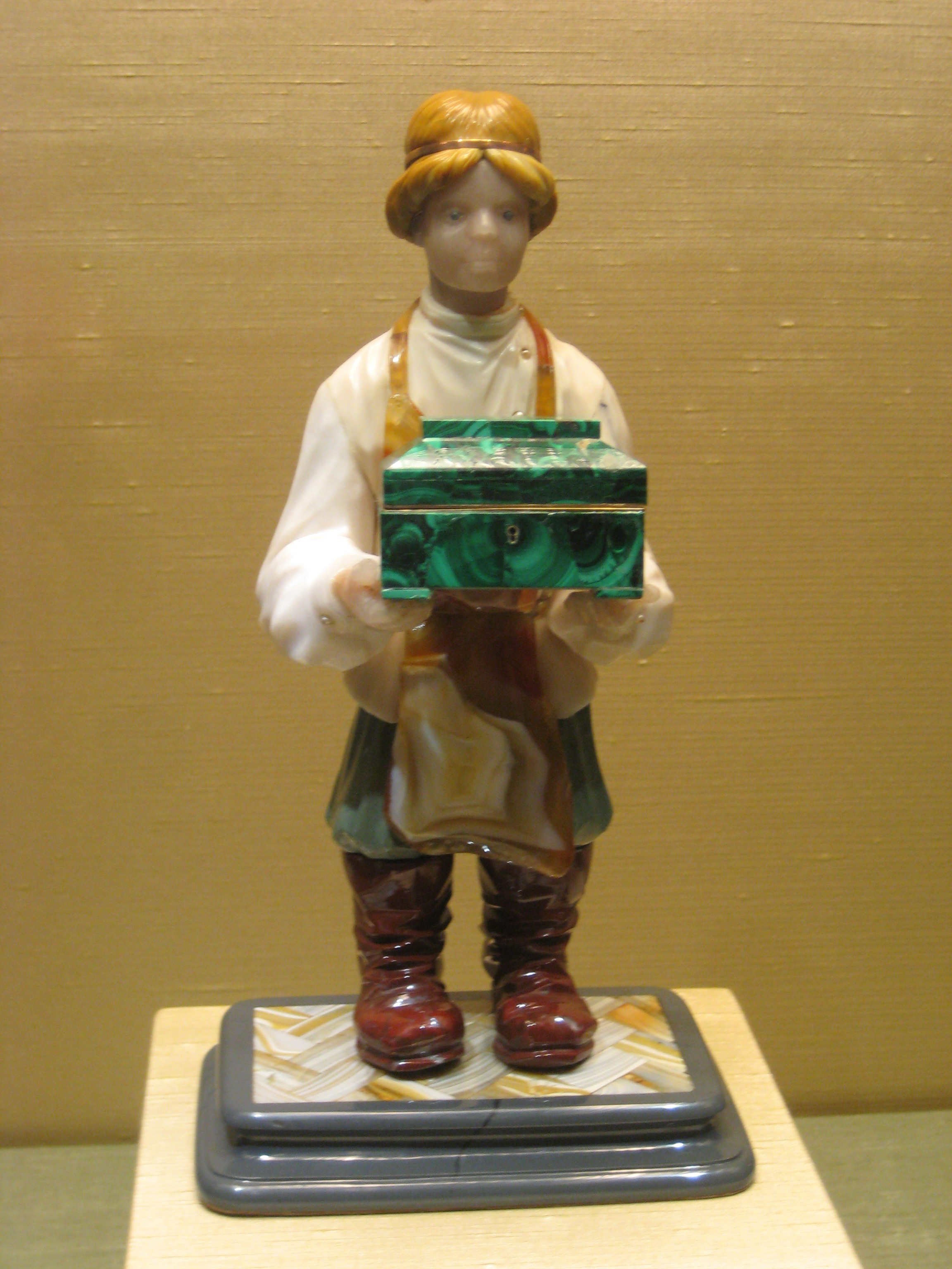 Данилушка. Василий Коноваленко